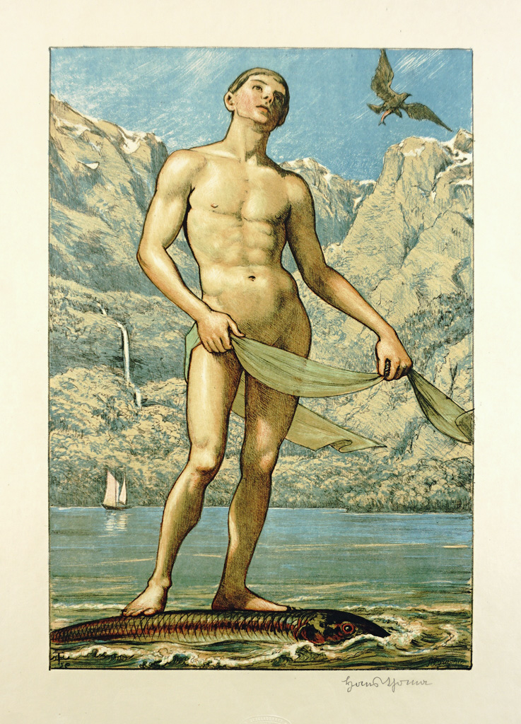 Jüngling auf einem Fisch stehend (Ganymed). Algraphie, handsigniert. Mit Trockenstempel 'Gesellschaft für vervielfält. Kunst Wien'. 56 x 45 cm (Blattgröße)